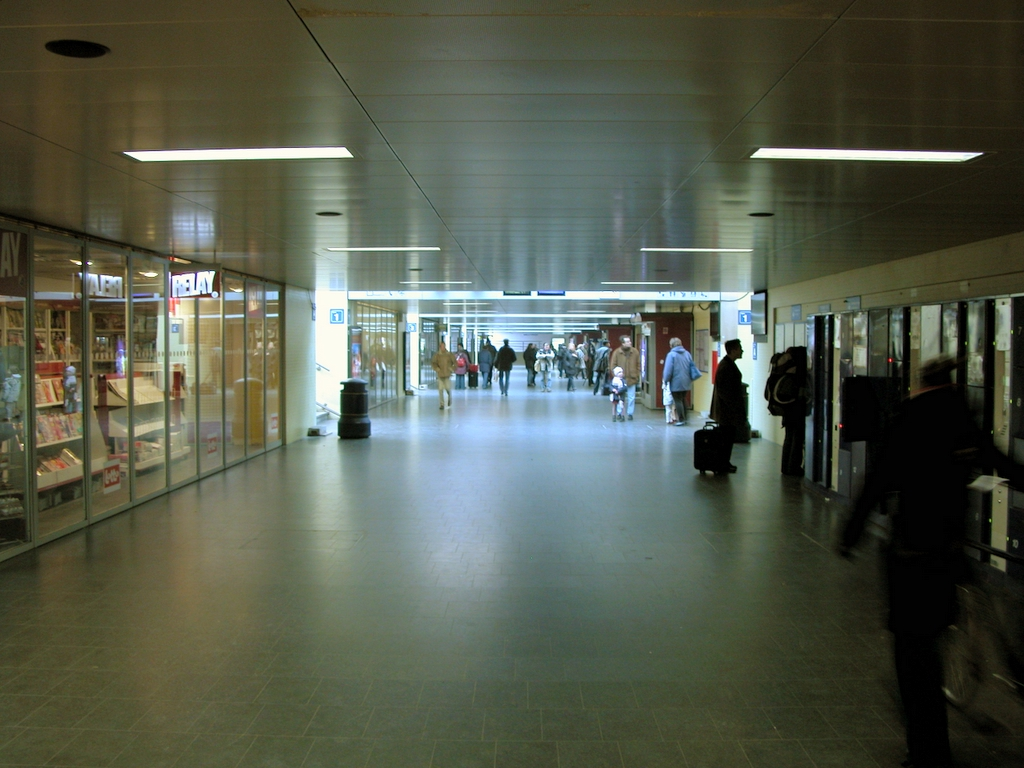 Station Leuven interieur